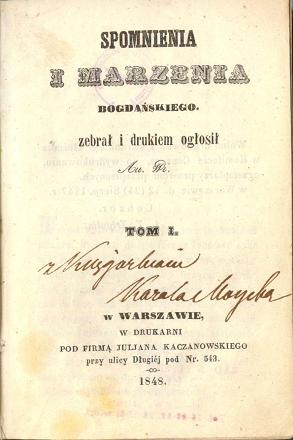 Strona tytułowa książki